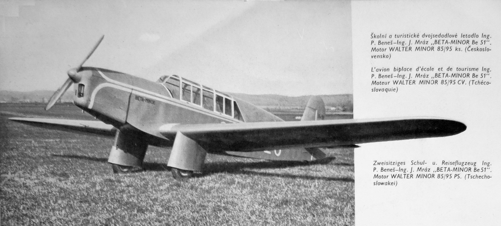 letecký motor Walter Minor 4 a letoun Be-51 (1936)